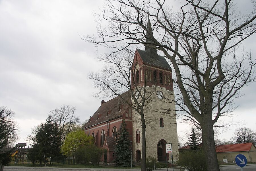 Markgrafpieske, Germany